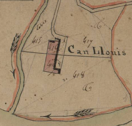 Can Lluís, de Serrallonga, en el Cadastre napoleònic del 1812 (Arxius Departamentals dels Pirineus Orientals)